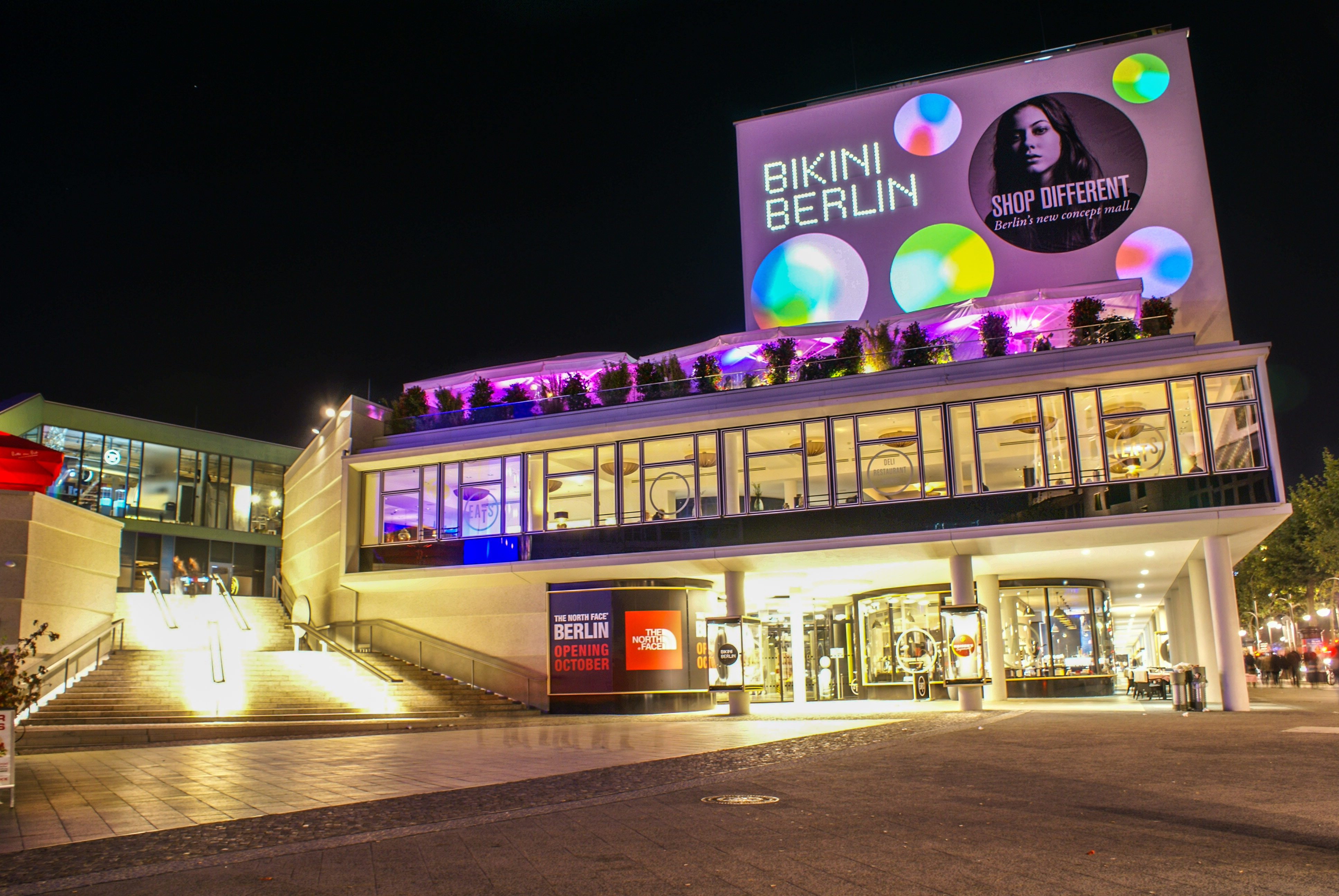 Das Bikini-Haus in Berlin an der Gedächtniskirche am Kudamm